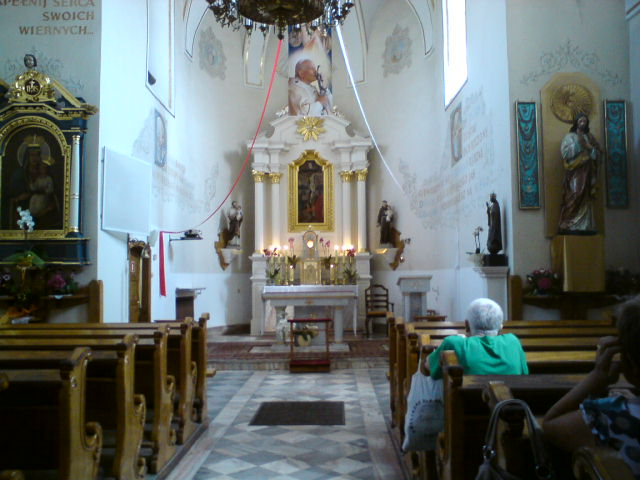 Jarosław, ul. Grunwaldzka 10 - kościół szpitalny pw. św. Ducha, 1669-1690, XVIII, 1820 (wnętrze)